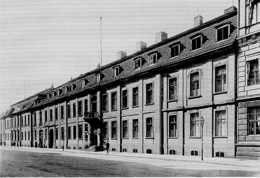 Das sogenannte Deckersche Haus, vormals Palais des Kriegs- und Domänenrats Oberbaudirektor Johann Carl Stoltze, 1735 bis 1738 errichtet und fast unverändert erhalten, wurde es 1877 vom Auswärtigen Amt des Deutschen Reiches übernommen. 1944/45 stark zerstört, wurde es 1948 bis 1950 abgerissen.